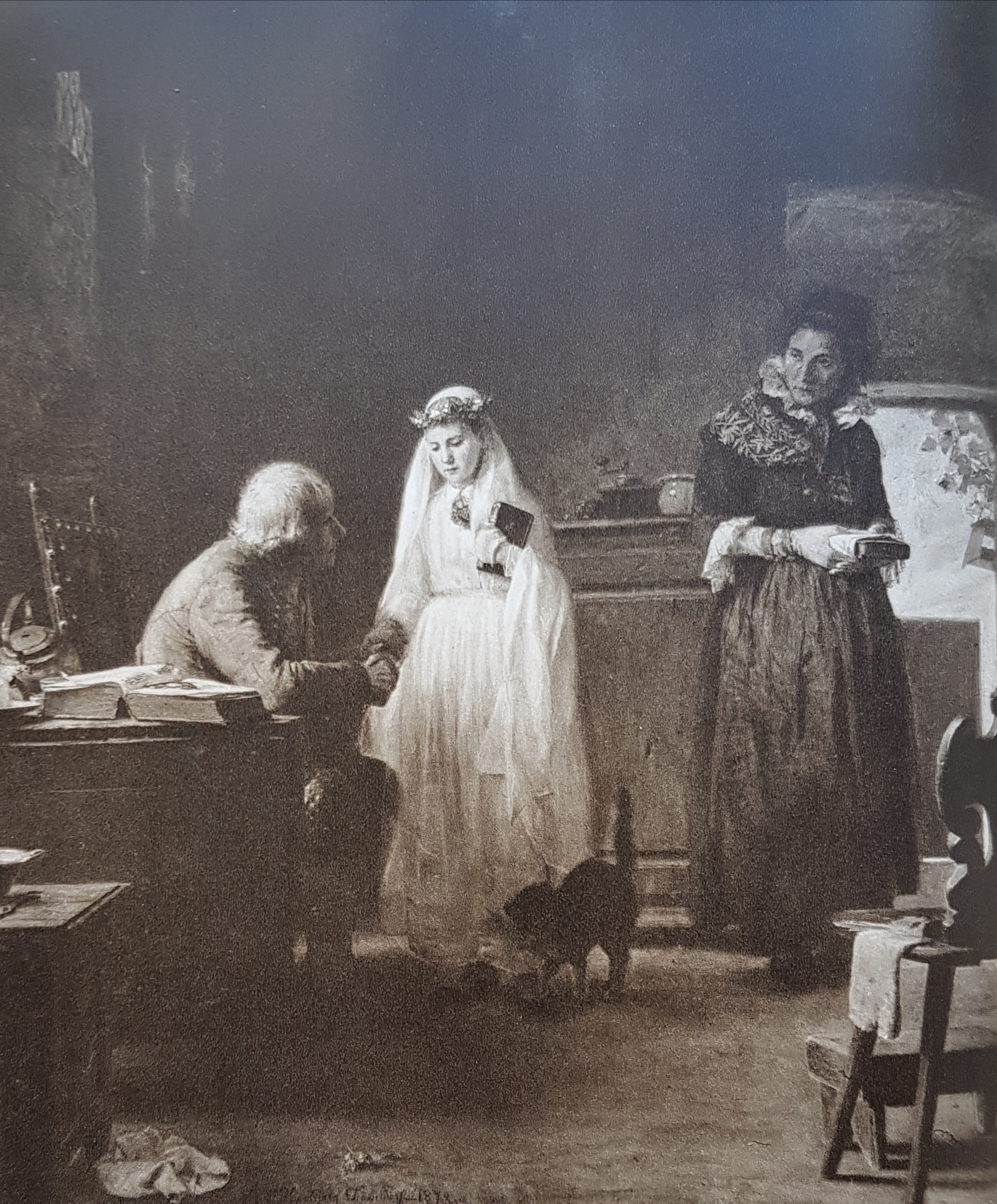 Konfirmand målad av Axel Gustaf Hertzberg, avfotograferad bild från Allhems Svenskt konstnärslexikon.